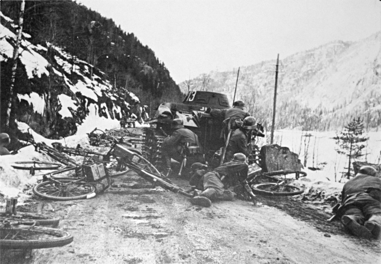 German forces under attac by Fenrik Kvaals group south of Bagn. See also Kampene langs Randsfjorden, i Ådalen og Valdres.